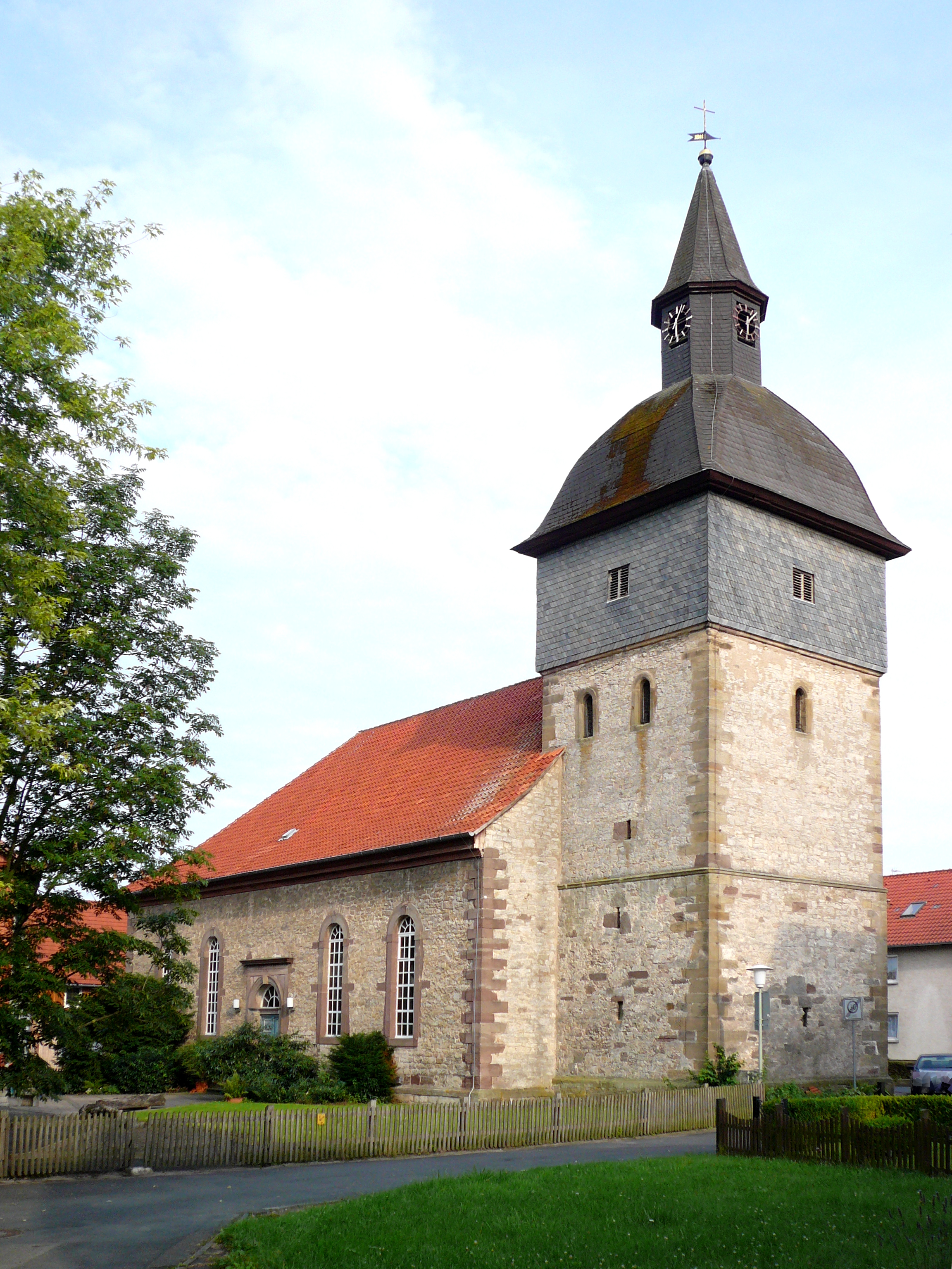 Dorfkirche St. Martini in Elliehausen, Stadt Göttingen, Niedersachsen. Erbaut 1829/30, Unterbau des Turmes mittelalterlich.